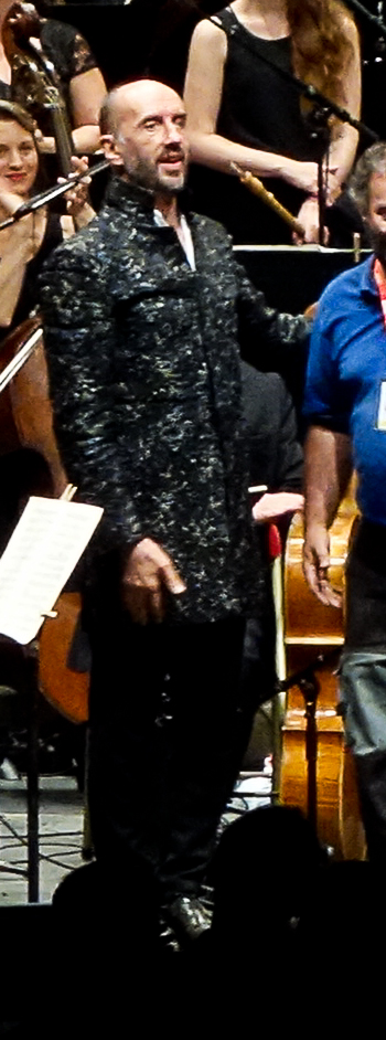 Hervé Niquet lors du concert au Château de Pupetières du 26/08/17. Festival Berlioz 2017.